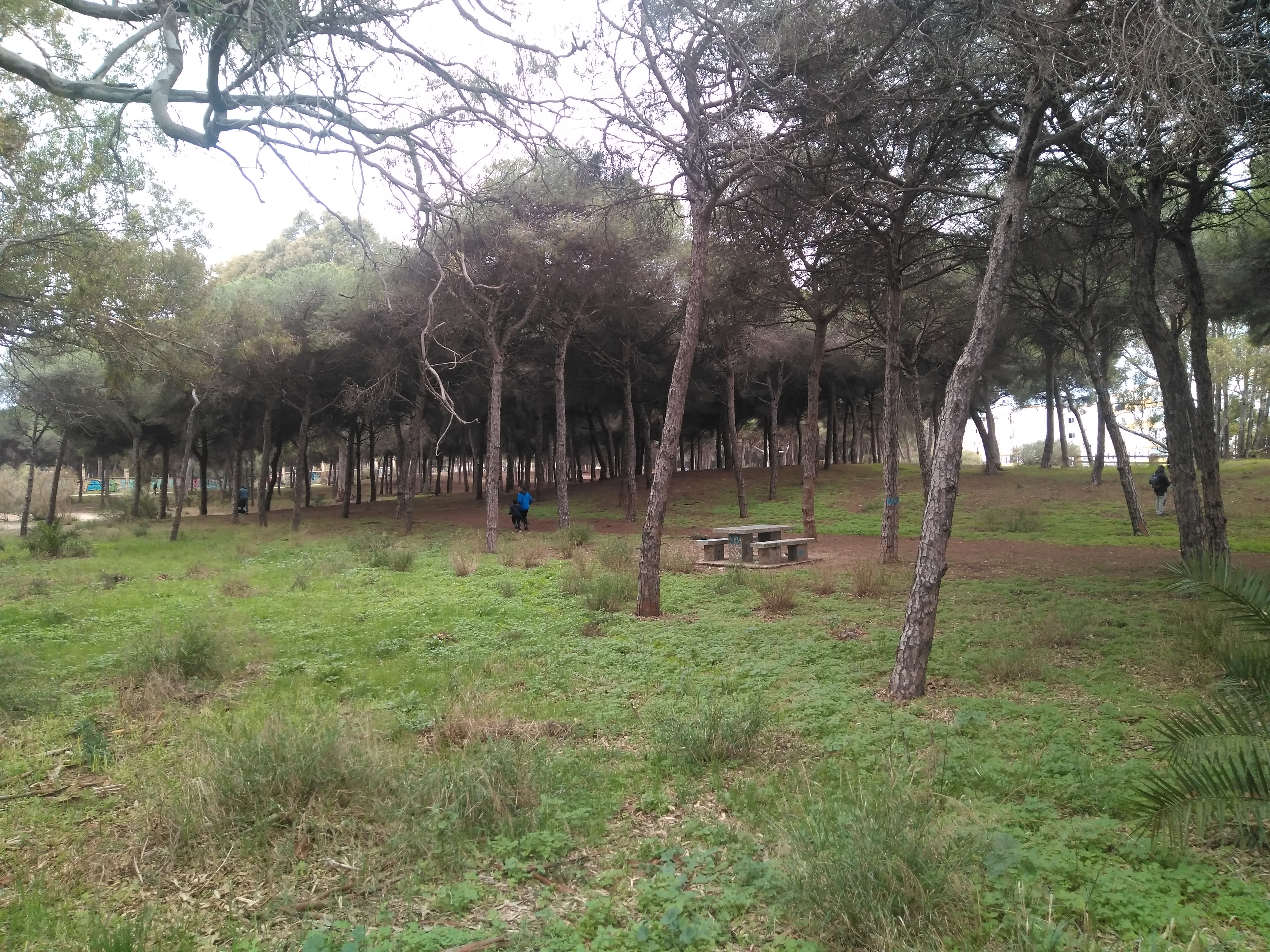 Pinares y Dunas de San Antón, El Puerto de Santa María (Andalucía, España)